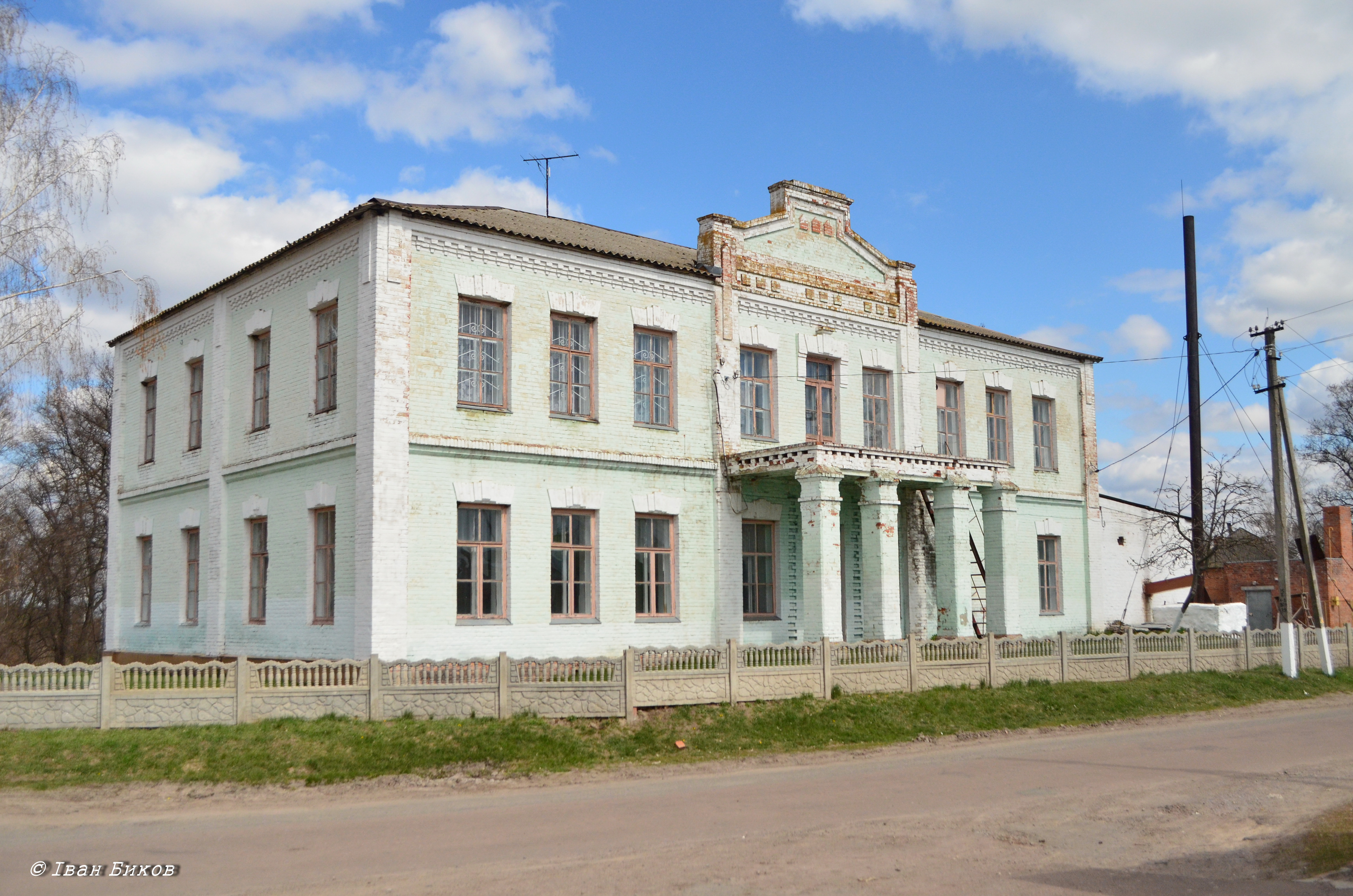 Двокласне училище, село Вирівка, вул. Будьонного, 27